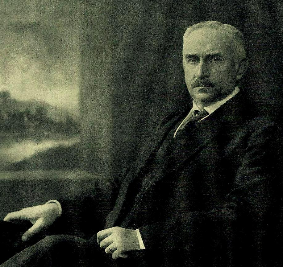 Porträt des Oberbürgermeisters Philipp Veltman, Aachen